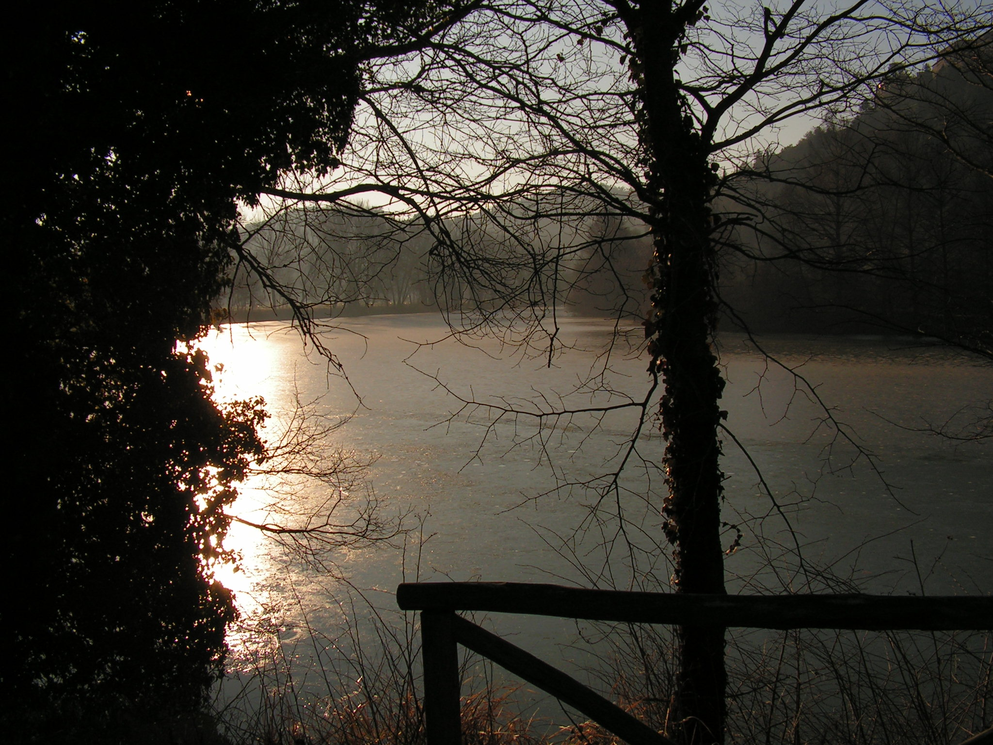 Riccardo Passagrilli Scorcio del Rio Grande - Amelia Italia